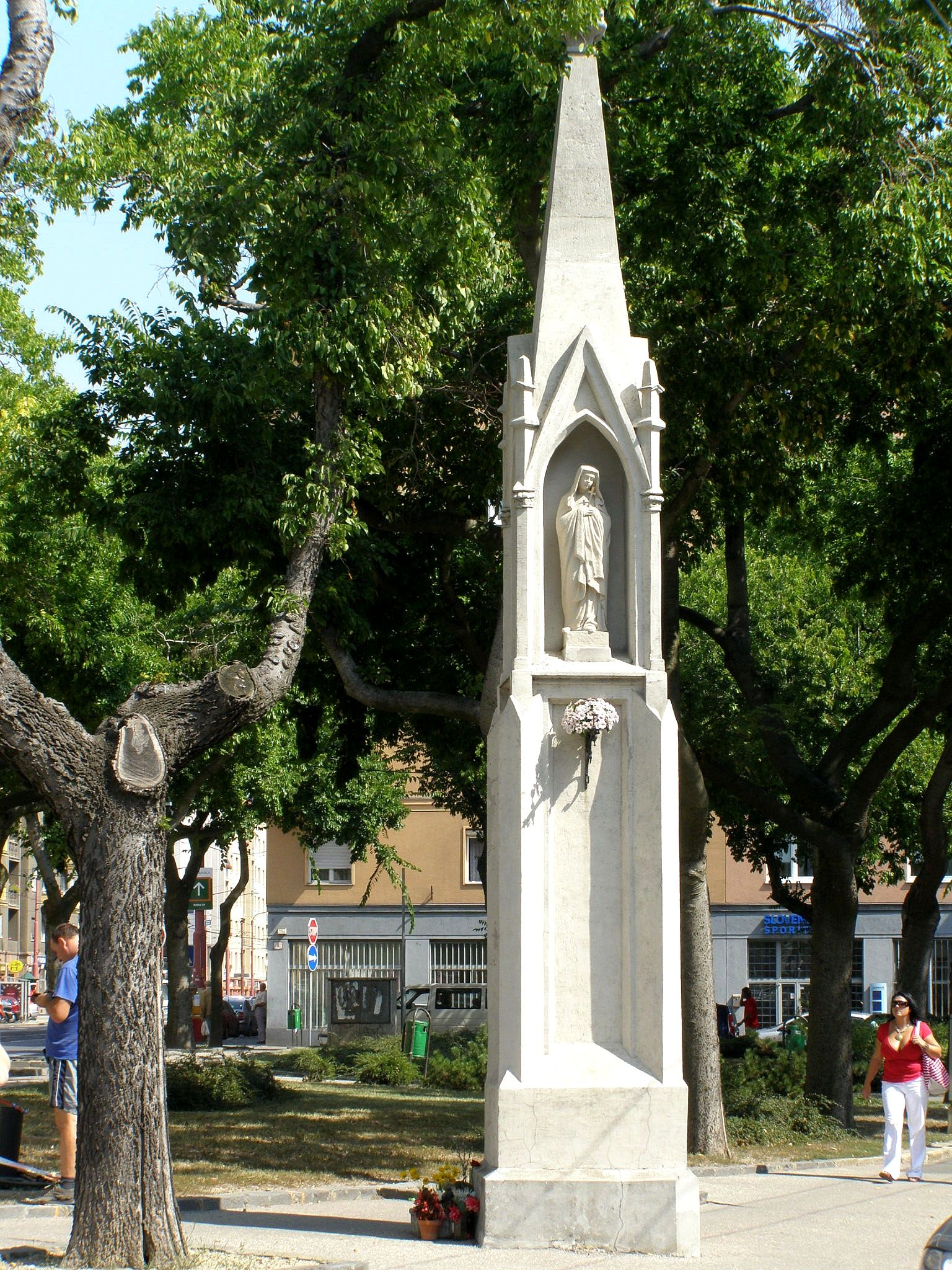 Božia muka na Odborárskom námestí v Bratislave je zaujímavým historickým architektonickým doplnkom v modernej zástavbe